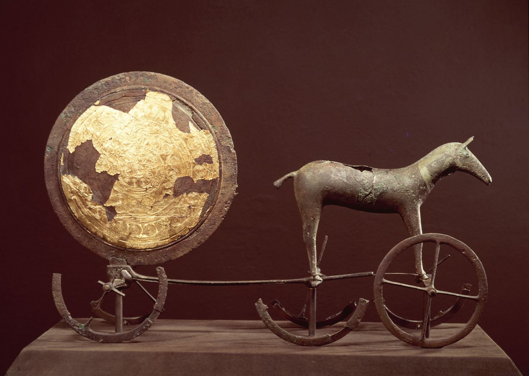 Solvognen, bronze og guld. Fra Trundholm mose, Højby sogn.